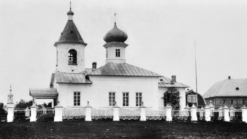 Церковь Сергия Радонежского. Большая Муксалма. Соловки.